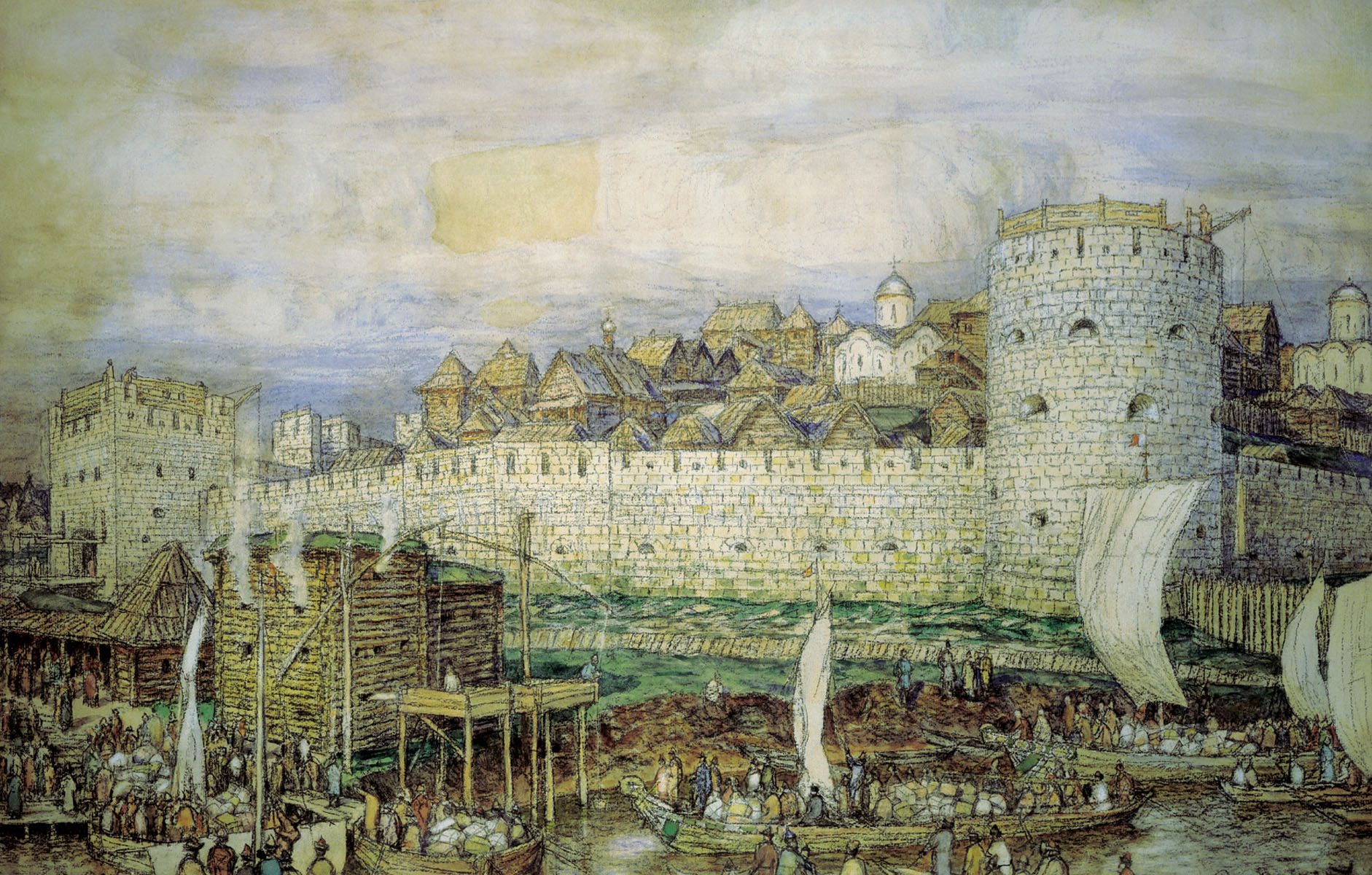 А. М. Васнецов. «Вероятный вид белокаменного Кремля Дмитрия Донского. Конец XIV века». 1922. Бумага на картоне, акварель, уголь. 51 × 80. Музей Москвы, Москва.